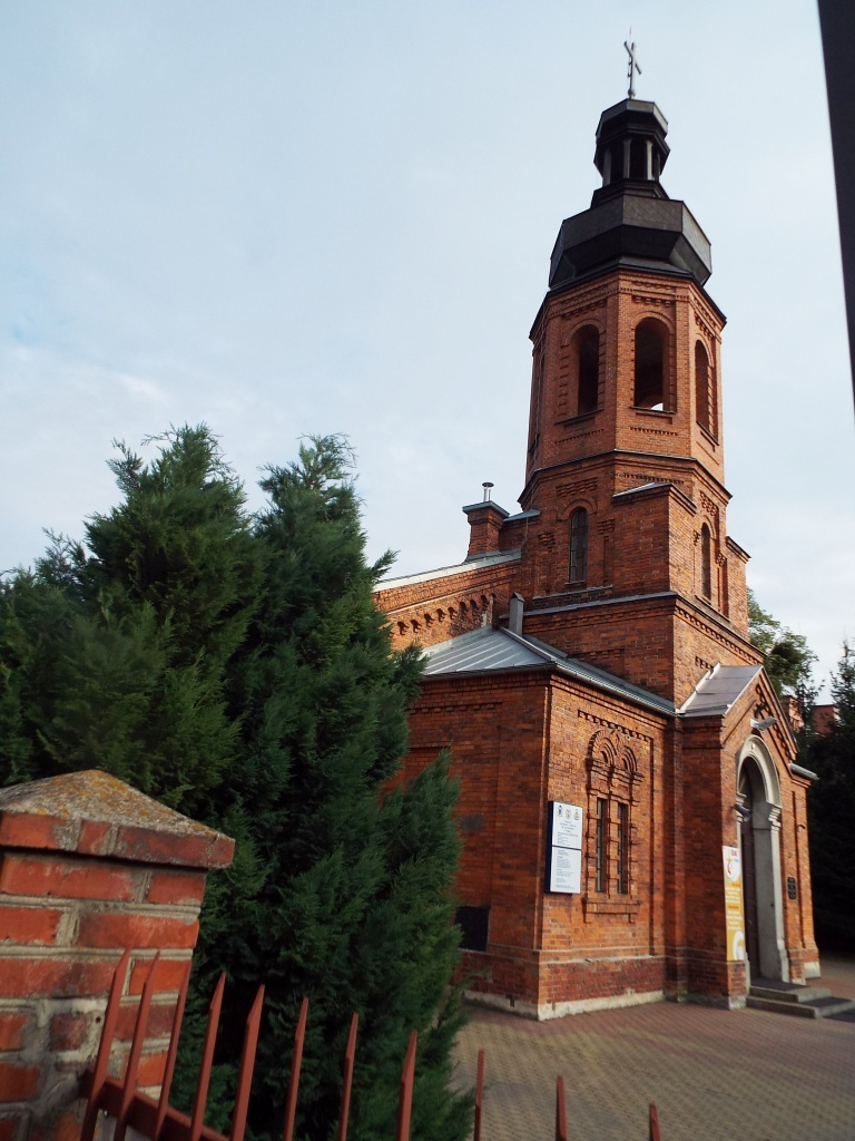 Chełm, ul. Koszarowa - garnizonowo-cywilny kościół parafialny p.w. św. Kazimierza (dawna cerkiew garnizonowa Świętej Trójcy wybudowana w 1856. W dwudziestoleciu międzywojennym przez pewien czas pełniła funkcję rzymskokatolickiego kościoła garnizonowego oraz mieściło się w niej kino "Strzelec" należące do 7 Pułku Piechoty Legionów. Potem w budowli mieścił się magazyn)